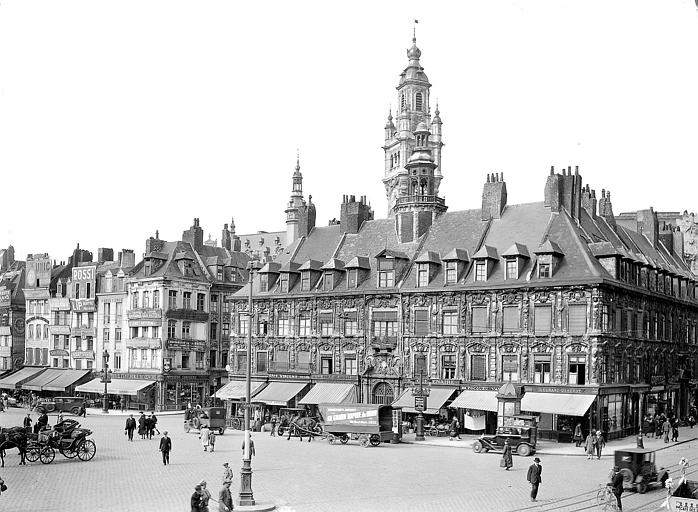 Vieille bourse du commerce à Lille, Georges-Louis Arlaud, vers 1925